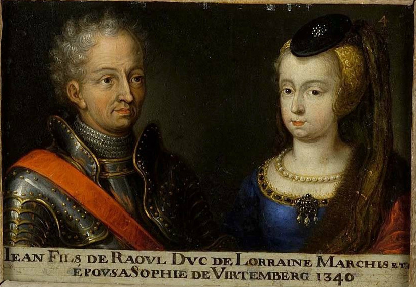 Portrait de Jean Ier, duc de Lorraine de 1346 à 1390, et de son épouse Sophie de Wurtemberg. Ce tableau fait partie d'une suite d'une soixantaine de double-portraits représentant les ducs et duchesses de Lorraine ainsi que leurs ancêtres supposés. Musée des Offices, Florence (Inv. 1890, 645)